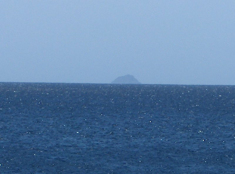 Foto dell'isola del Toro, scattata dall'isola di San Pietro.